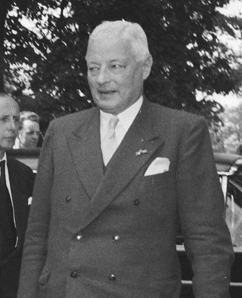 Collectie / Archief : Fotocollectie Anefo Reportage / Serie : Koningin Juliana brengt een bezoek aan Twente Beschrijving : Aankomst van koningin Juliana in Enschede Datum : 4 juli 1960 Locatie : Enschede, Overijssel Trefwoorden : burgemeesters, koninginnen Persoonsnaam : Juliana (koningin Nederland) Fotograaf : Pot, Harry / Anefo Auteursrechthebbende : Nationaal Archief Materiaalsoort : Negatief (zwart/wit) Nummer archiefinventaris : bekijk toegang 2.24.01.03 Bestanddeelnummer : 911-3955